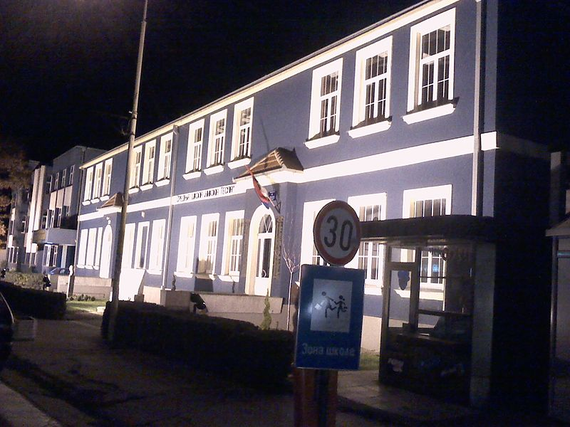 Srpski (latinica): Srednja škola „Nikola Tesla“ Batočina